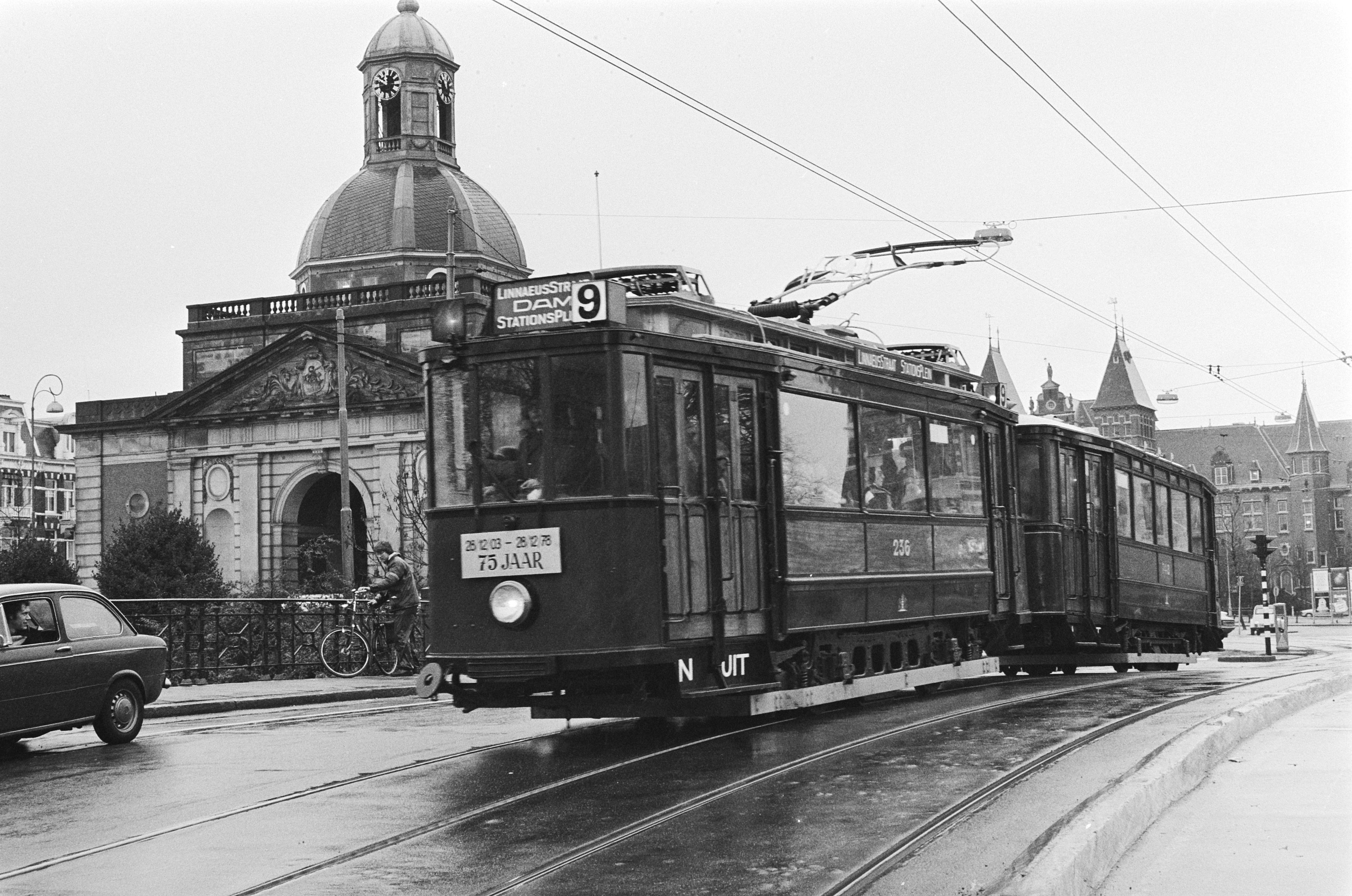 Collectie / Archief : Fotocollectie Anefo Reportage / Serie : [ onbekend ] Beschrijving : Tramstel uit 1913 maakt rit door Amsterdam Oost i.v.m. jubileum lijn 9 Datum : 28 december 1978 Locatie : Amsterdam, Noord-Holland Trefwoorden : jubilea, trams Fotograaf : Croes, Rob C. / Anefo Auteursrechthebbende : Nationaal Archief Materiaalsoort : Negatief (zwart/wit) Nummer archiefinventaris : bekijk toegang 2.24.01.05 Bestanddeelnummer : 930-0605